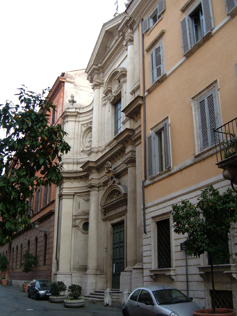 Chiesa di S. Caterina da Siena in via Giulia, a Roma, rione Regola.